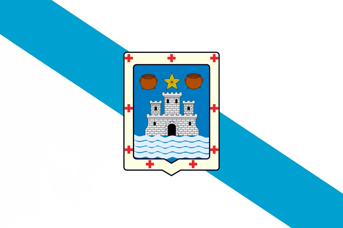 Bandera de Oleiros (legitima)